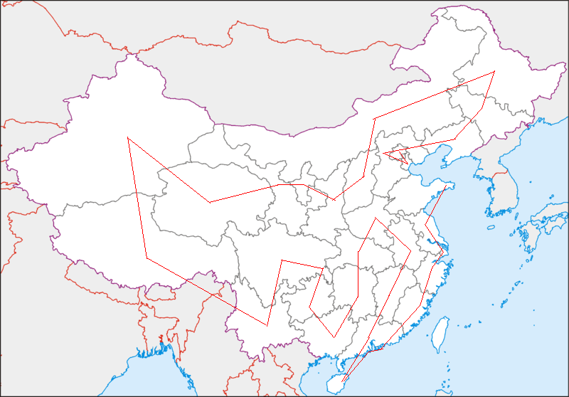 十一運會聖火傳遞路線圖。